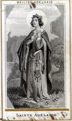 Santez Adelheid Bourgogn. Heilige Adelhaid en alamaneg. E vamm, Adelaid Bourgogn.